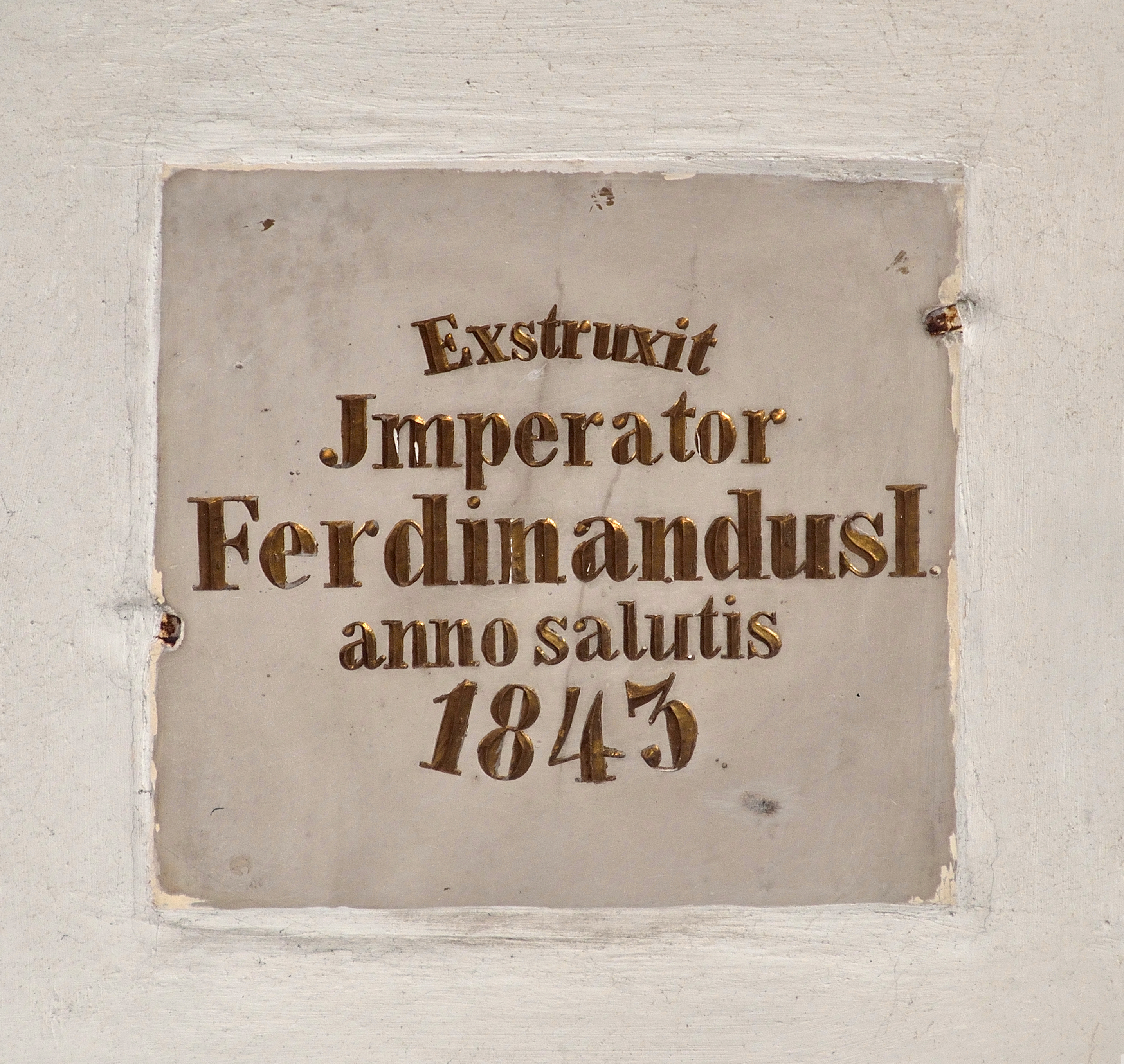 Gedenktafel für Ferdinand I von Austria in der Pfarrkirche hl. Martin in Marbach an der Donau. Exstruxit Imperator Ferdinandus I. anno salutis 1843 (Errichtet von Kaiser Ferdinand I. im Jahr des Heils 1843).